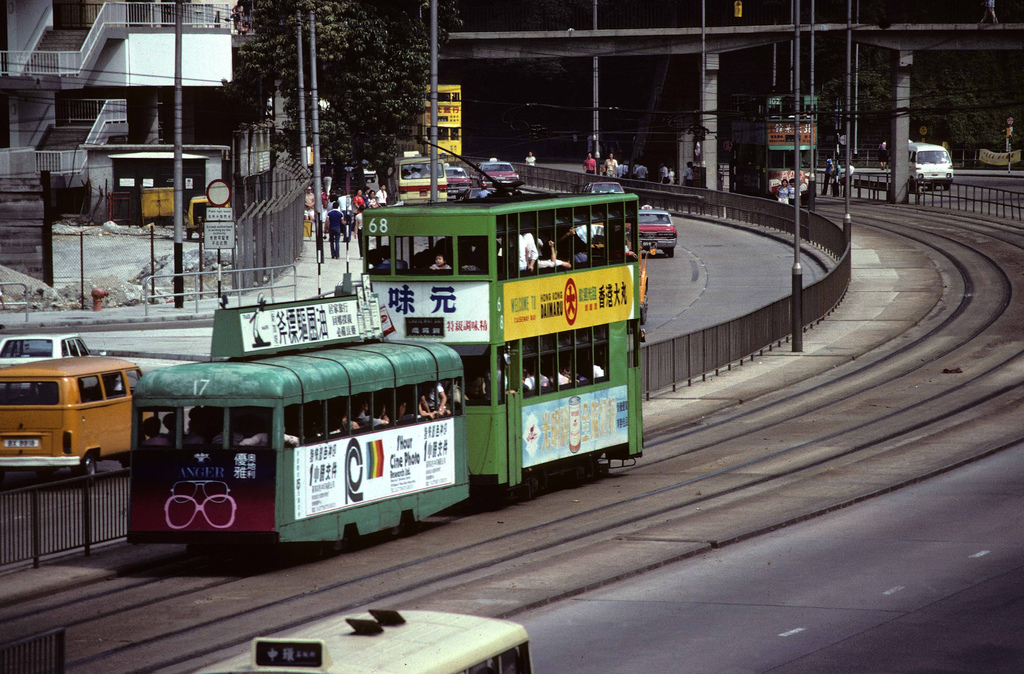 香港 金鐘 1970